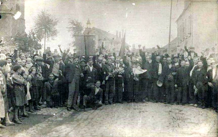 photo de grévistes de l'ancienne Compagnie des Mines de Thivencelle (aujourd'hui disparue)